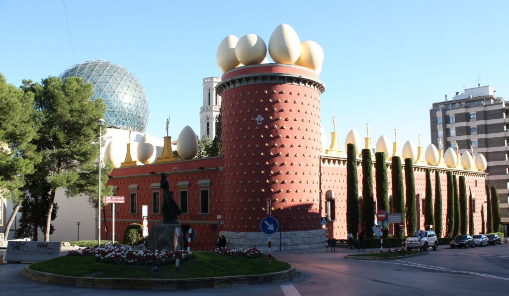 Salvador Dali teater-muuseum Figuereses Hispaanias.